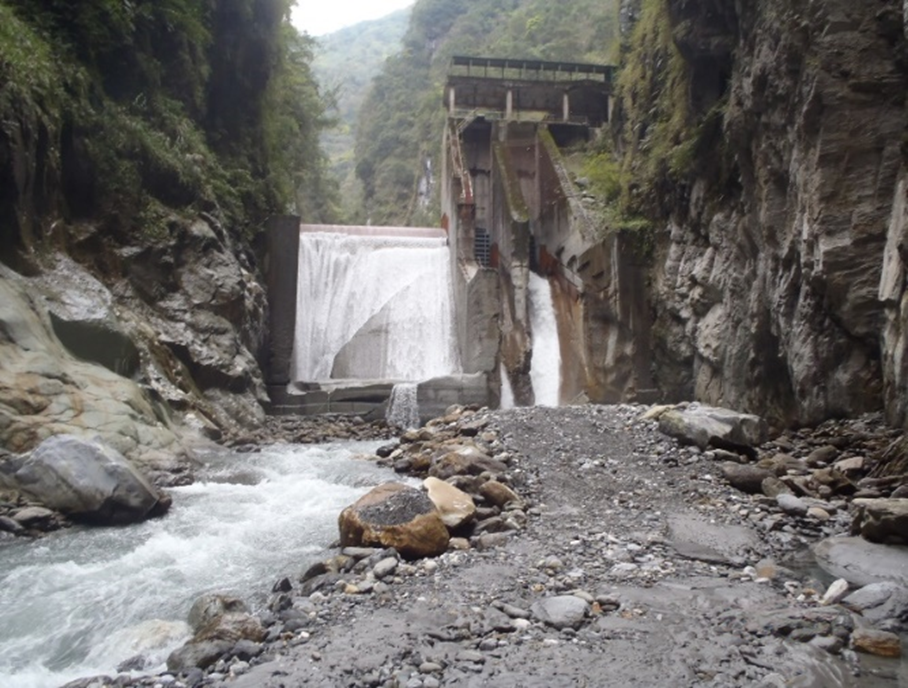 中文（台灣）: 臺灣電力公司東部發電廠發電壩體 木瓜壩